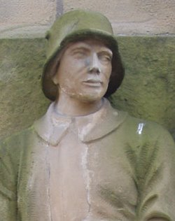 Kriegerdenkmal bei der Peterskirche in Heilbronn-Neckargartach